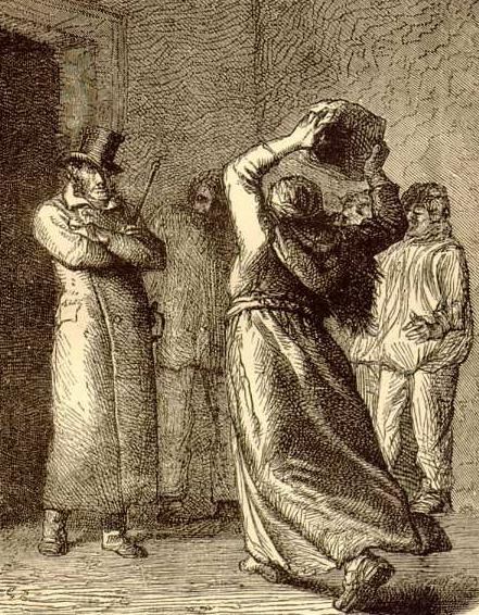 On devrait toujours commencer par arrêter les victimes : la Thénardier jette un pavé à la tête de Javert qui s'apprête à arrêter Thénardier et toute sa bande. Illustration de Gustave Brion pour Les Misérables de Victor Hugo, tome III, livre huitième.